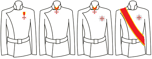 Modo di indossare le decorazioni dell'Ordine di San Gregorio Magno (Stato Pontificio - Città del Vaticano)